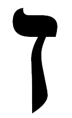 hebrew letter zayin